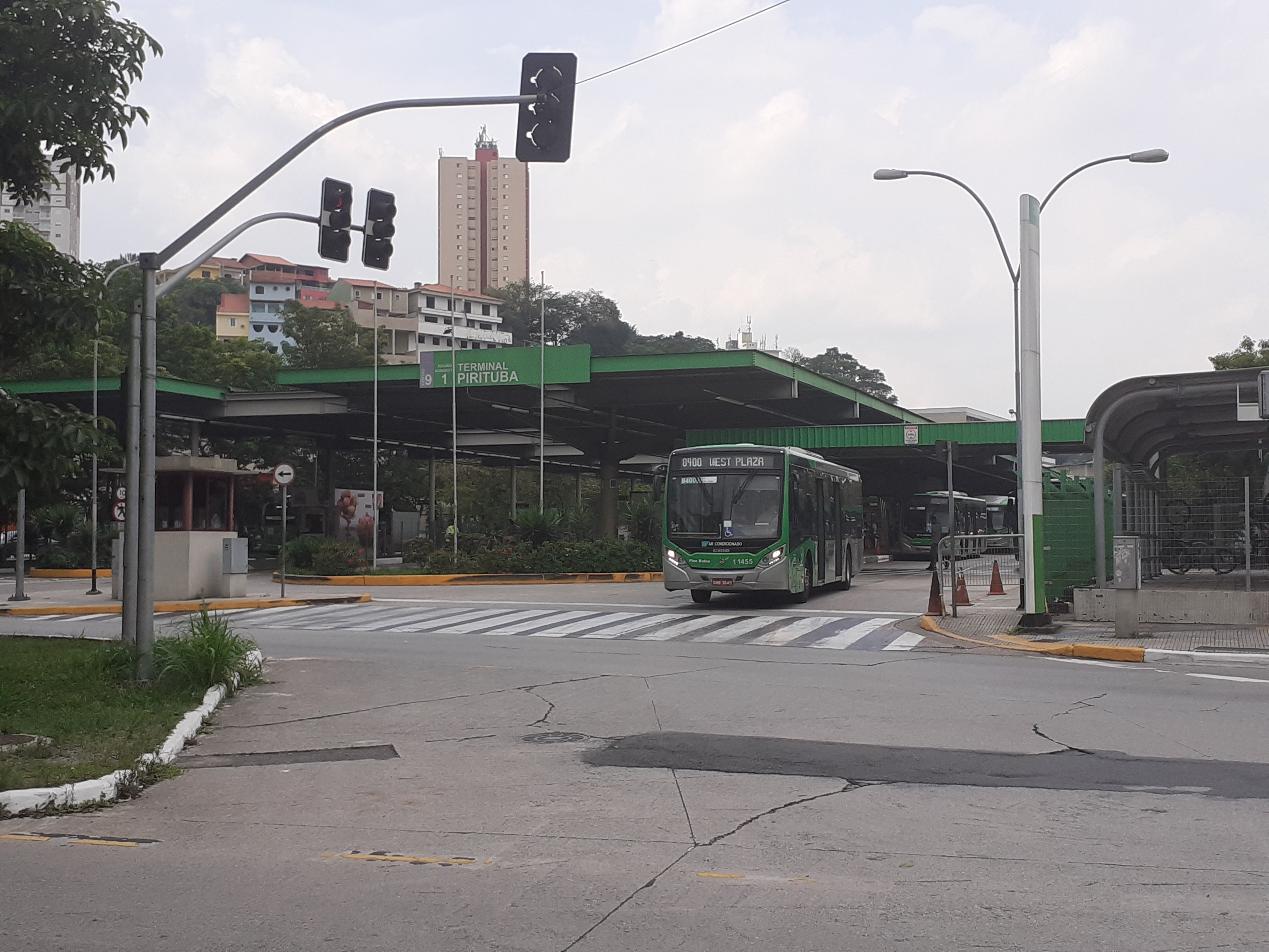 Vista da entrada principal para ônibus do Terminal Pirituba, localizado na Zona Norte da cidade de São Paulo, Brasil.